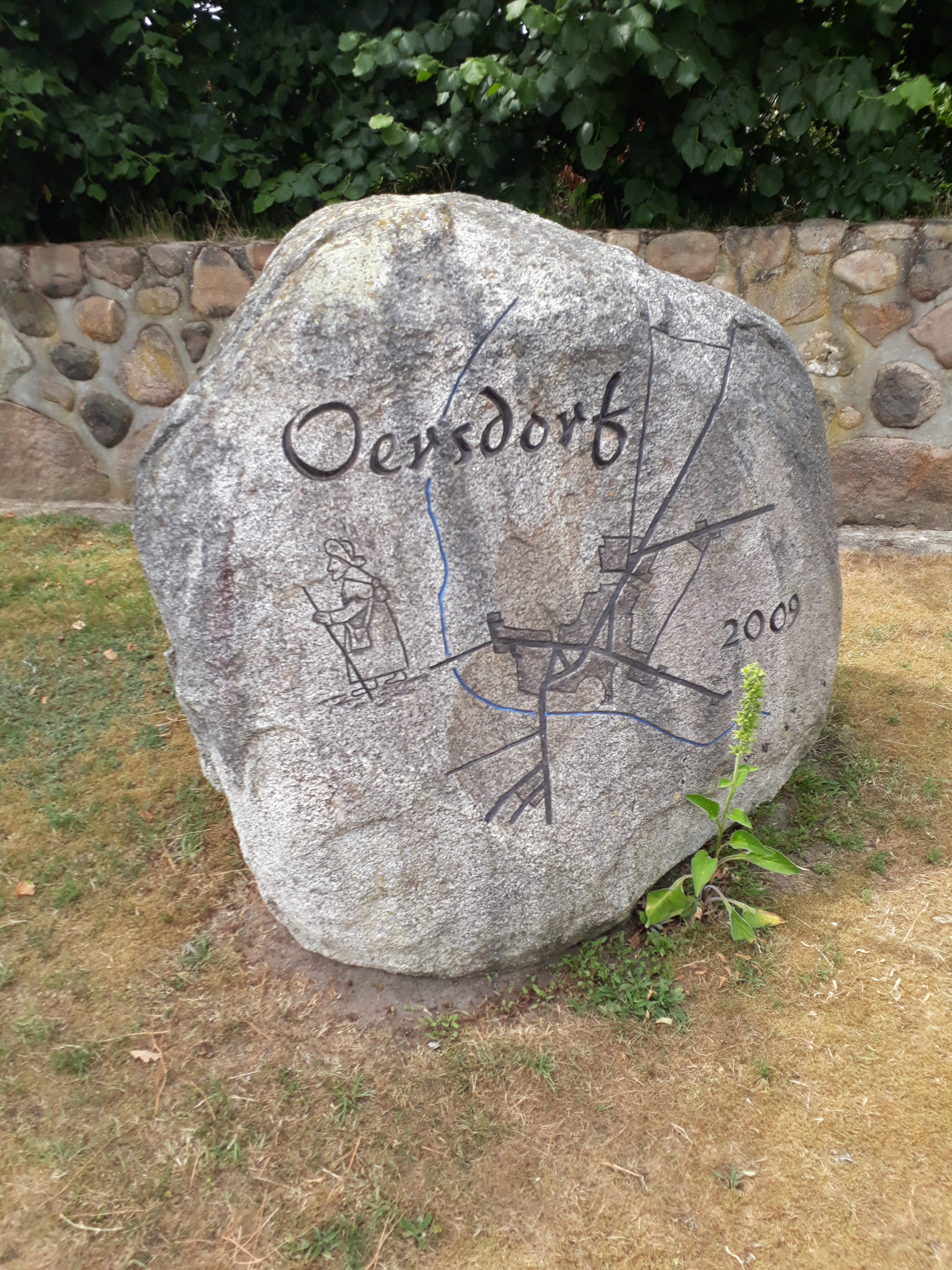 Gedenkstein in Oersdorf, Ahlerstedt (Via Romea).